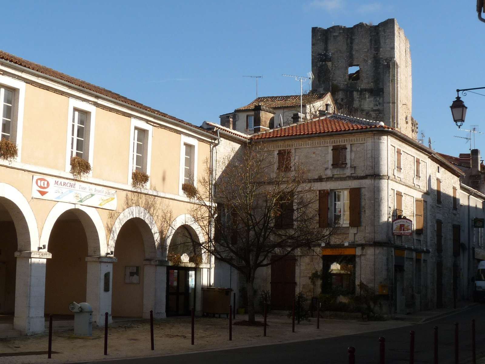 centre de Marthon (carrefour D.16 et D.4), Charente, France